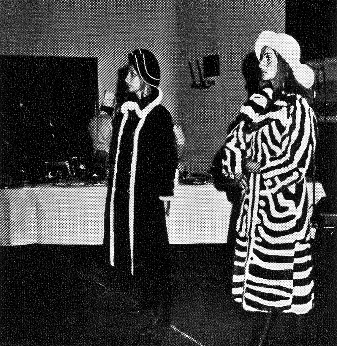 Gemeinschaftliche Pelzmodenschau von 19 Düsseldorfer Pelzhäusern am 31. August 1971 im Düsseldorfer „Hilton“. Show: Petra Nova und ihre Pop Dancers. In Kooperation mit dem Düsseldorfer Hut-Modellhaus Tessy Steigleder. Die Eintrittsgelder von ca. 10.000 DM wurden dem Deutschen Kinderschutzbund e. V. gespendet. Zwei (Nerz-?)Mäntel, einer in zebraähnlicher Verarbeitung.